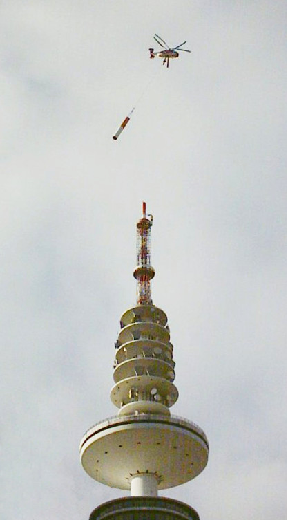 Austausch der Antenne des Heinrich-Hertz-Turmes in Hamburg mit einem Kamow Ka-32 Hubschrauber; Anflug mit einem Element zur Turmspitze